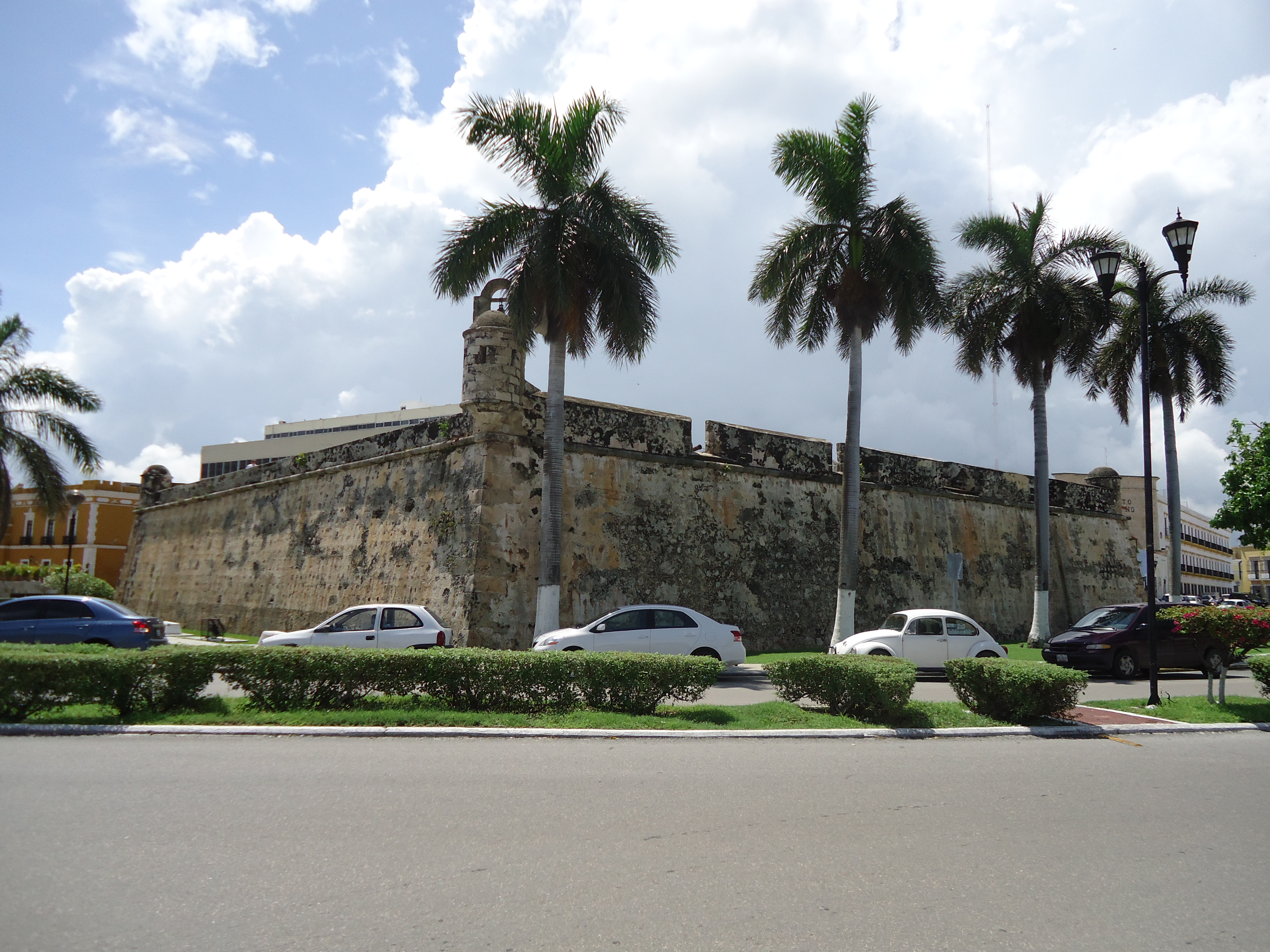 Fotografía del Baluarte de San Carlos, San Francisco de Campeche, Campeche